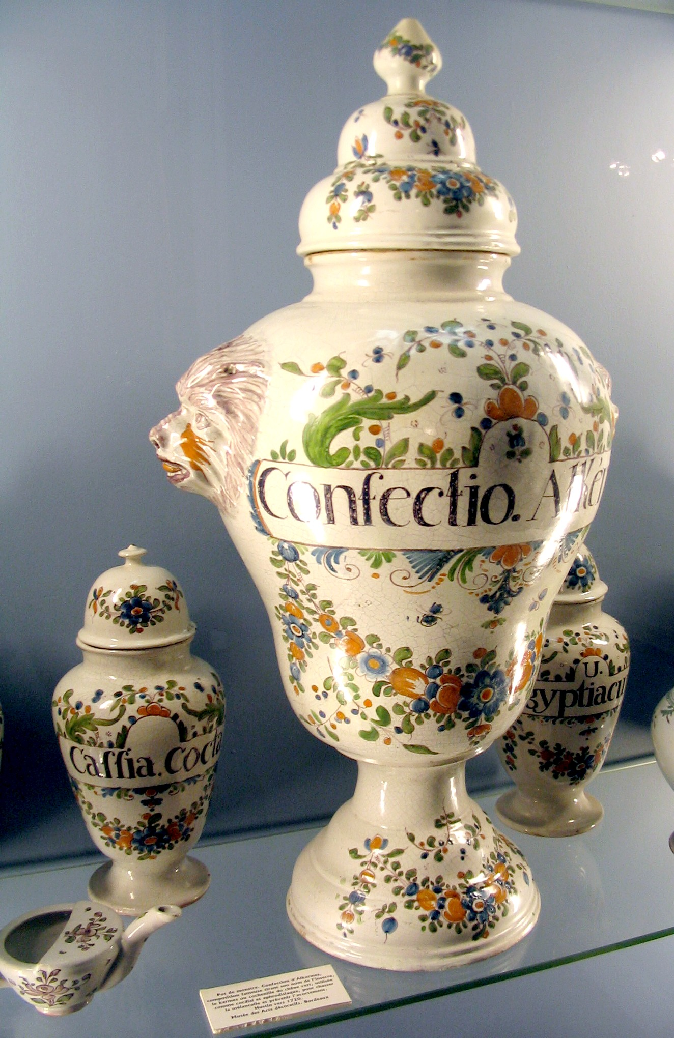 Pot à pharmacie en faïence de Bordeaux. Pot de monstre. Confection d'Alkermes, composition fameuse tirant son nom de l'insecte, le kermes ou cochenille du chêne vert, utilisée comme cordial et aphrodisiaque, pour chasser la mélancolie et prévenir l'avortement. Manufacture Hustin, Musée des arts décoratifs de Bordeaux, France, vers 1720.